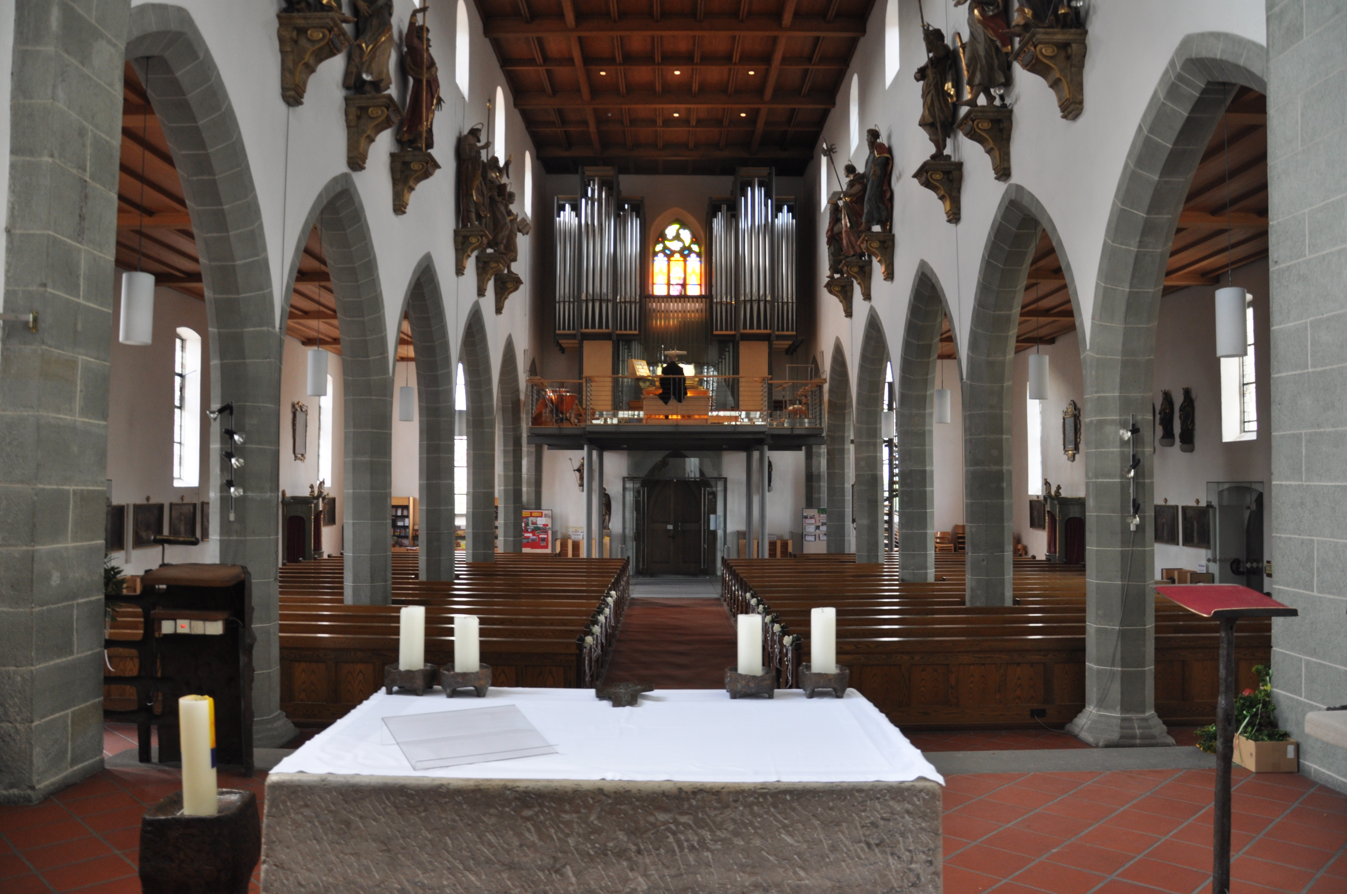 Kath. Pfarrkirche St. Nikolaus, Markdorf Blick vom Chor zur Empore